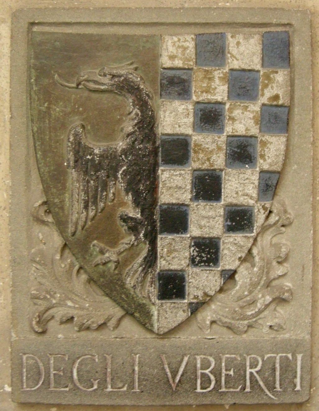 Cortile di michelozzo, targa dante, stemma uberti